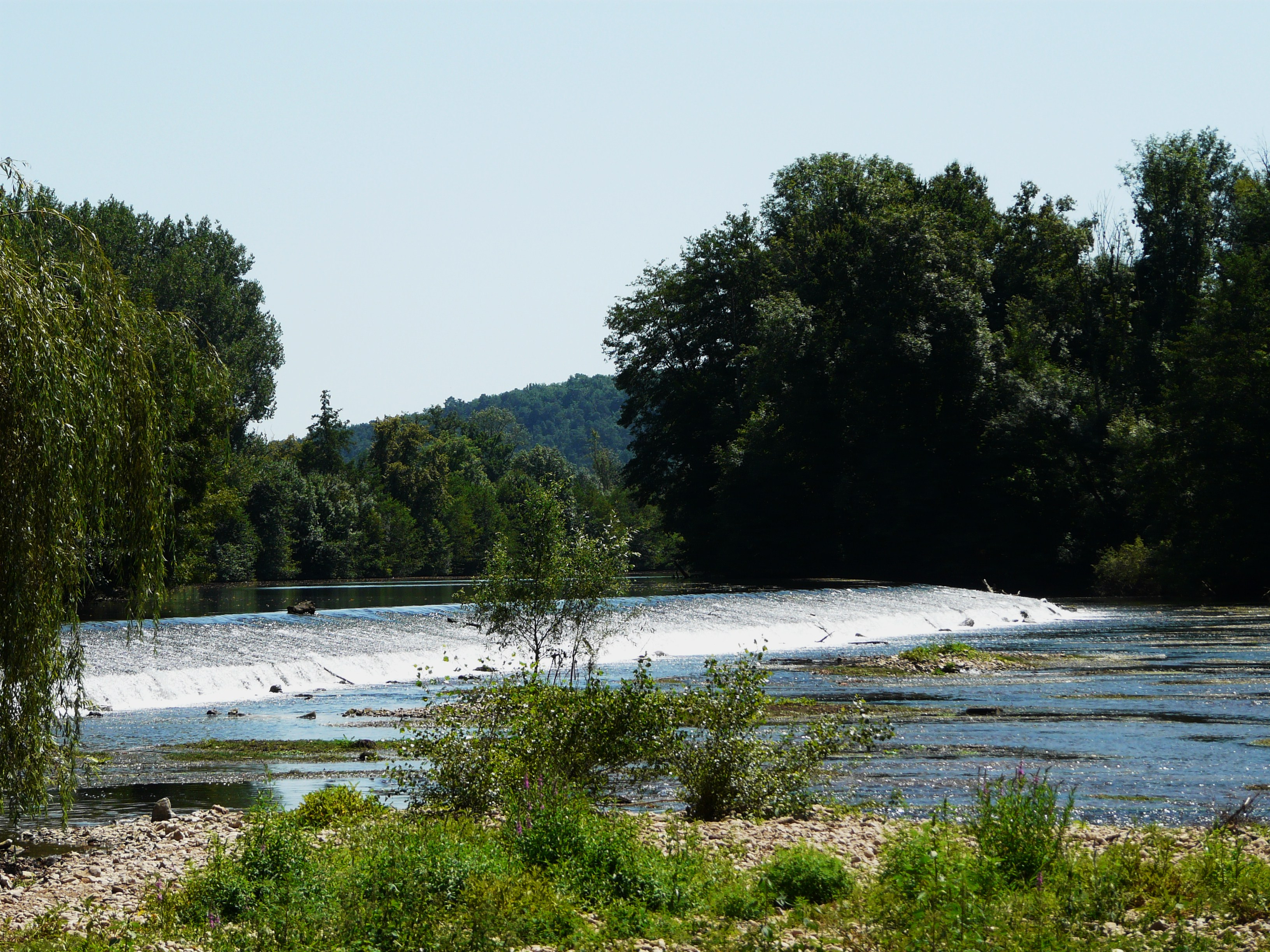 L'Isle au barrage de Taillepetit, à Annesse-et-Beaulieu, Dordogne, France